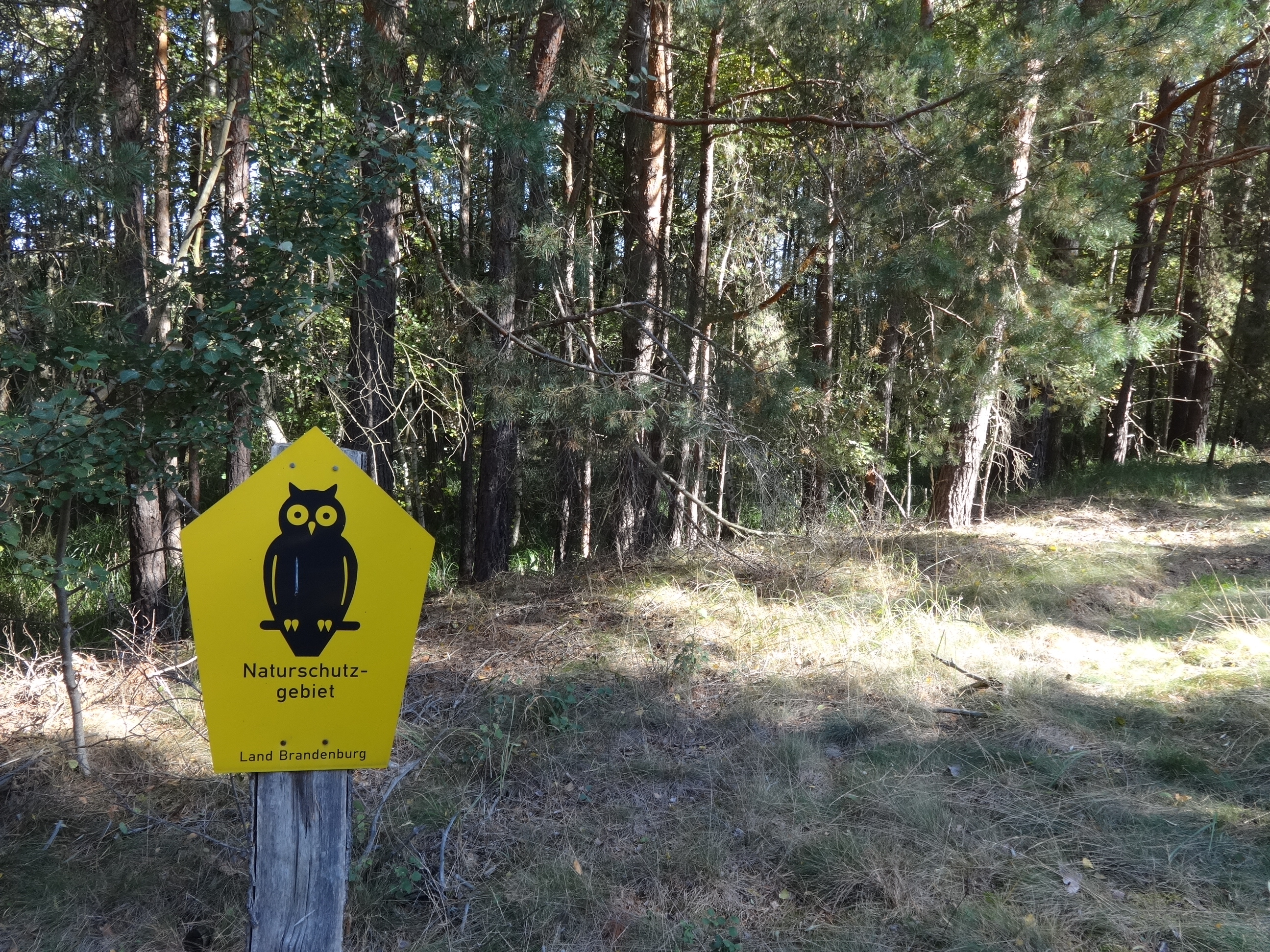 Das Naturschutzgebiet Löptener Fenne–Wustrickwiesen ist ein rund 218 Hektar großes Naturschutzgebiet im Landkreis Dahme-Spreewald. Es wurde im Mai 1998 unter Schutz gestellt. Naturschutzgebiet Löptener Fenne–Wustrickwiesen